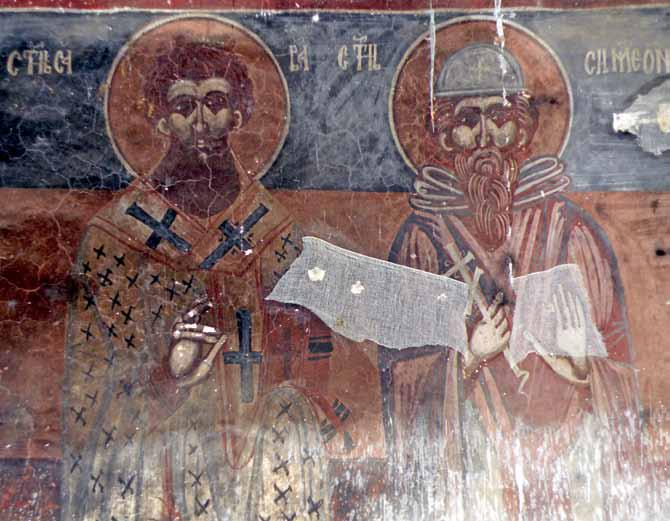 Фреска на Св. Сава и Св. Симеон во Црквата „Св. Ѓорѓи“ во охридското село Врбјани